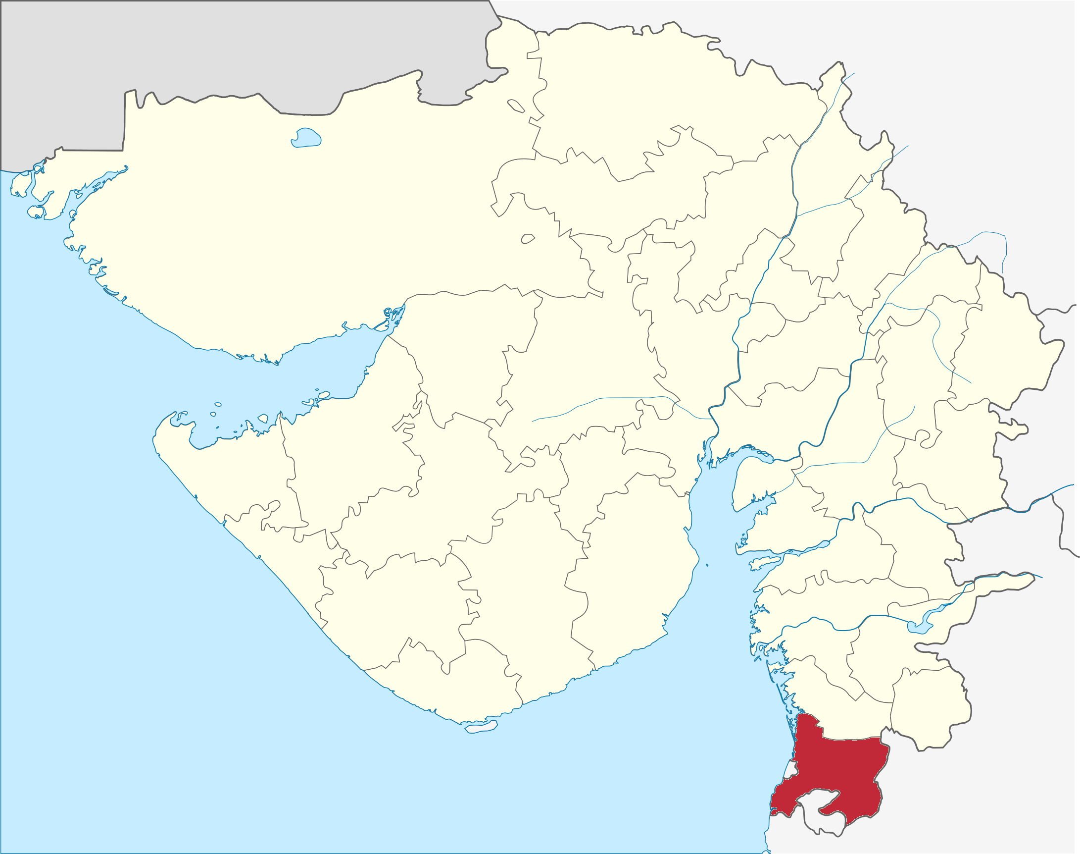 Distrito de Valsad en Gujarat